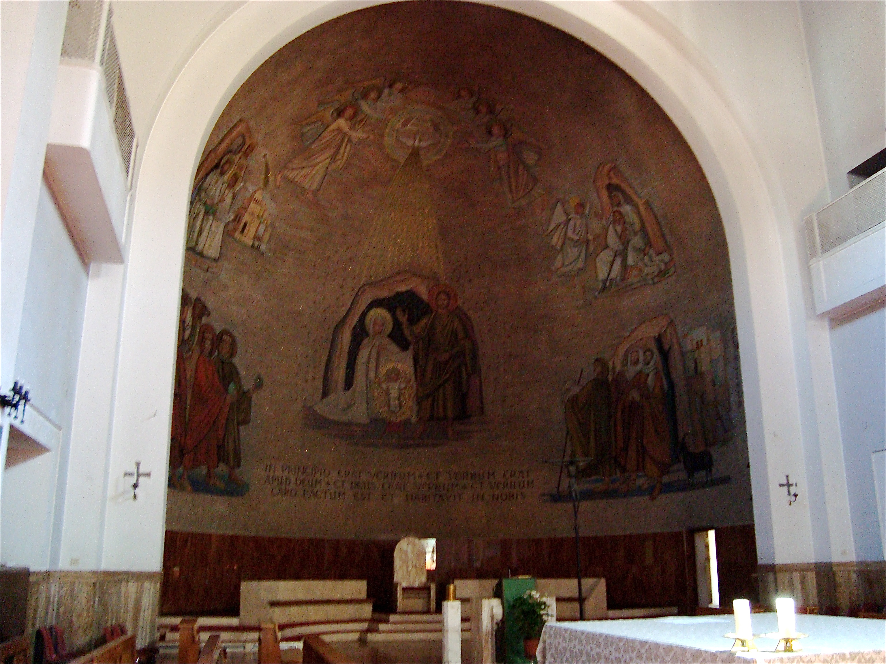 Intérieur de l'Église Natività di Nostro Signore Gesù Cristo de Rome dans le quartier de l'Appio Latino